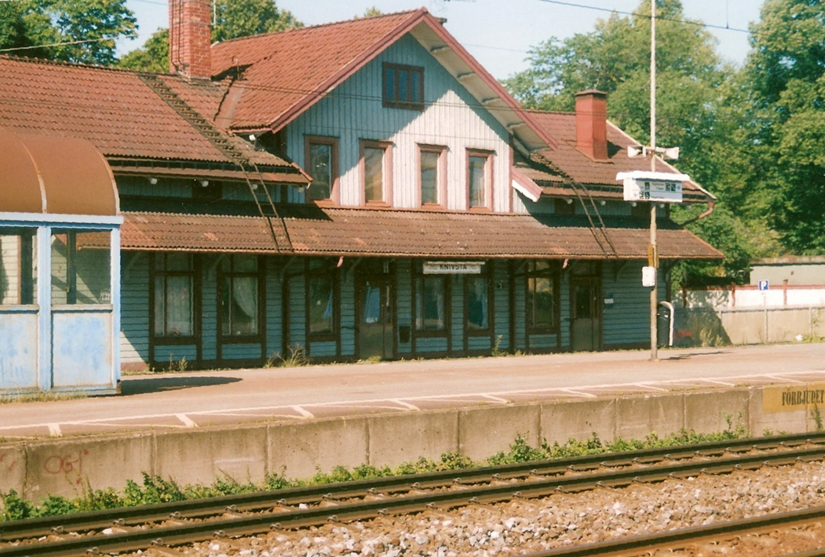 Station van Knivsta. Eigen opname.